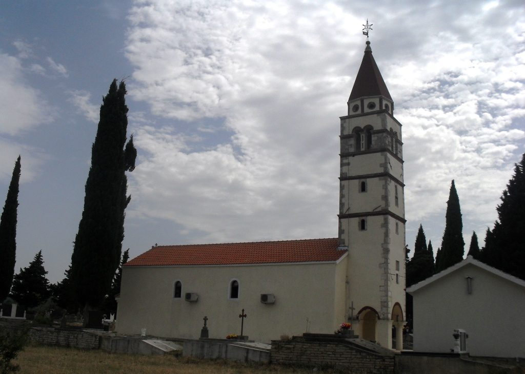 Храм СПЦ Св. Кирика и Јулите у Доњем Карину, Далмација